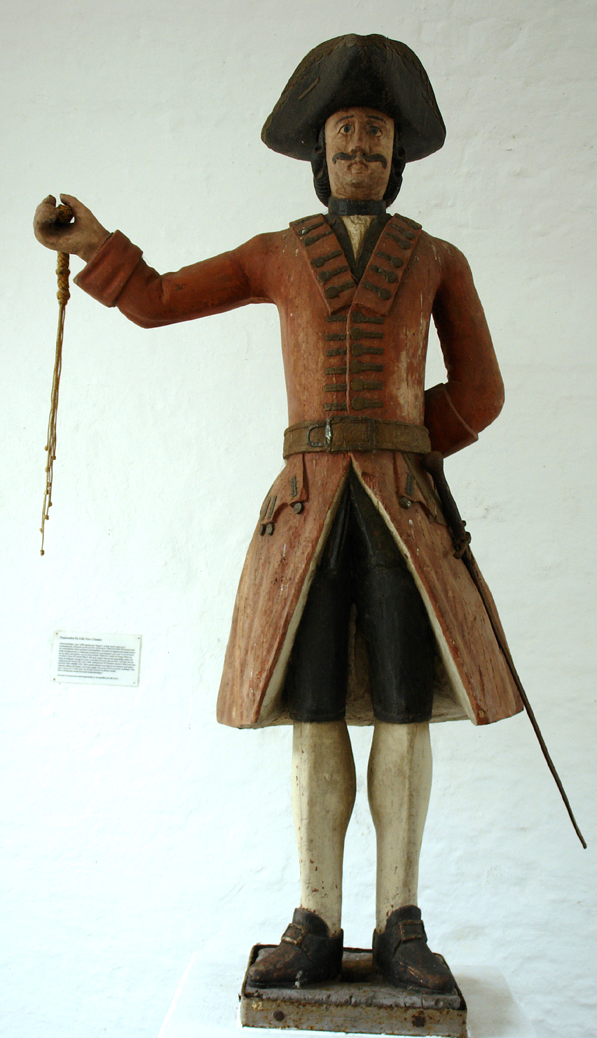 Tønder-Museum: Staupe-Figur (Kagmand) von 1699. Die Figur des Profos (Soldat, der kleine Strafen ausführen musste) ist die einzige bewahrte dieser Art in Dänemark. Seit 1993 steht auf dem Torvet eine Nachbildung